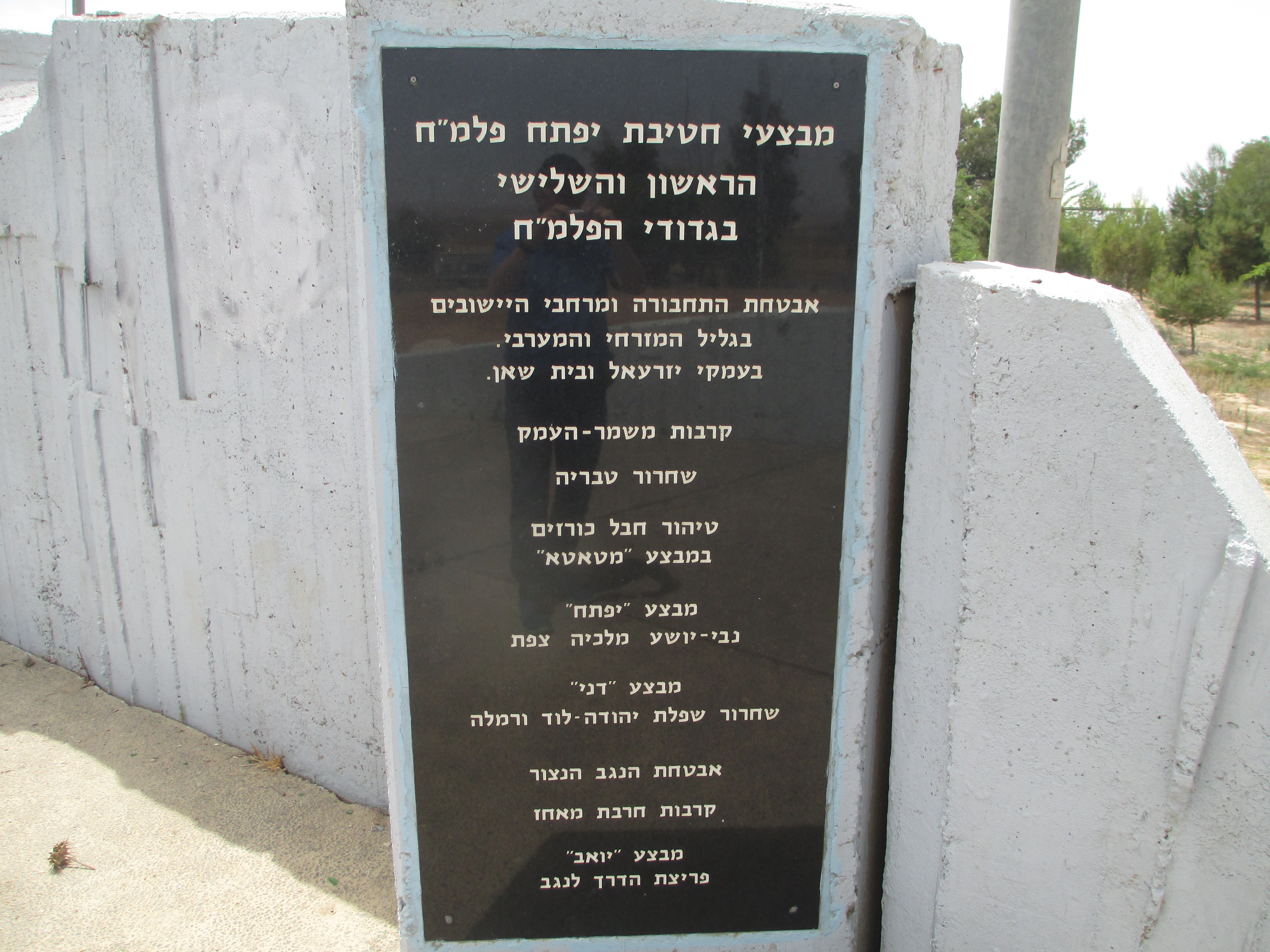 אנדרטת חטיבת יפתח בנגב